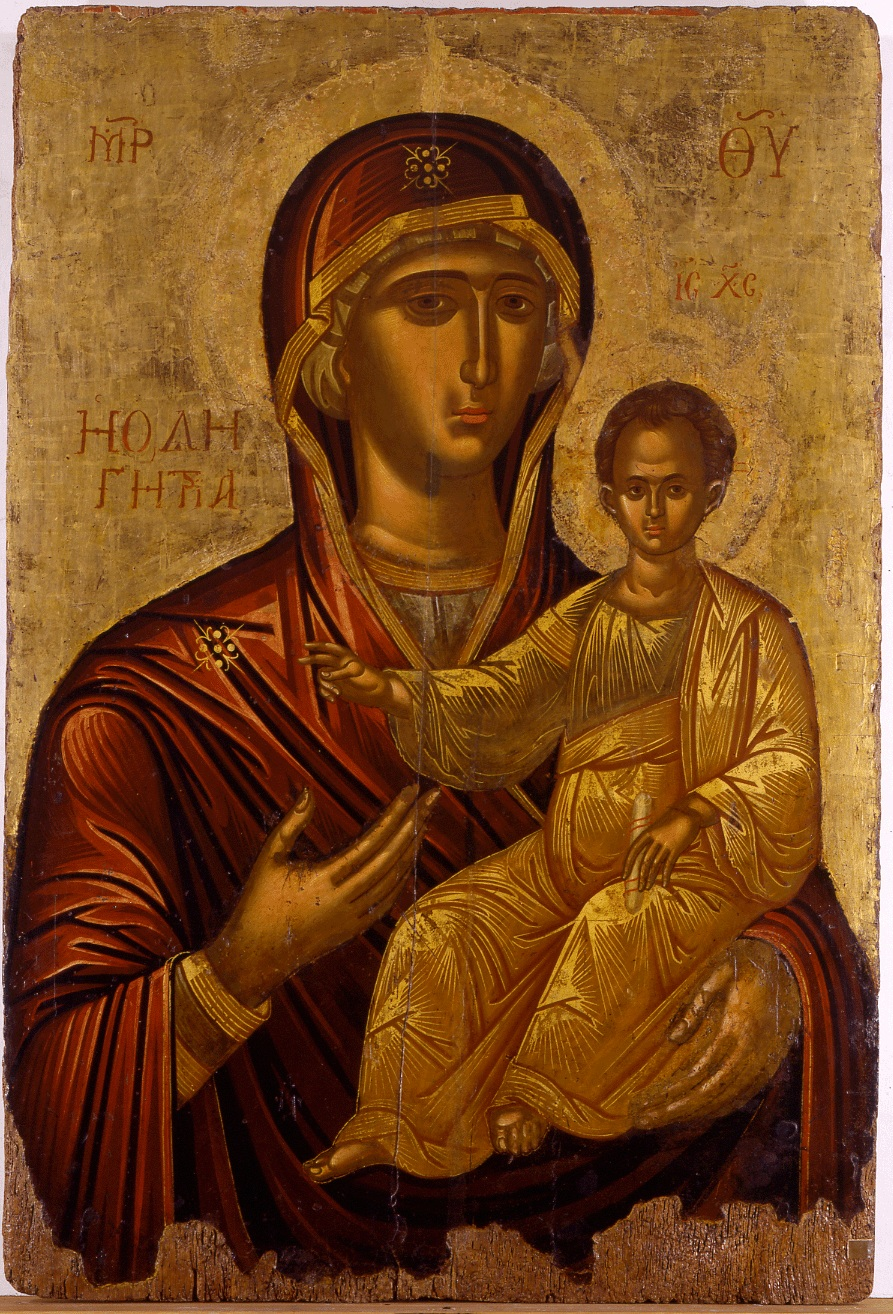 Un'icona messinese